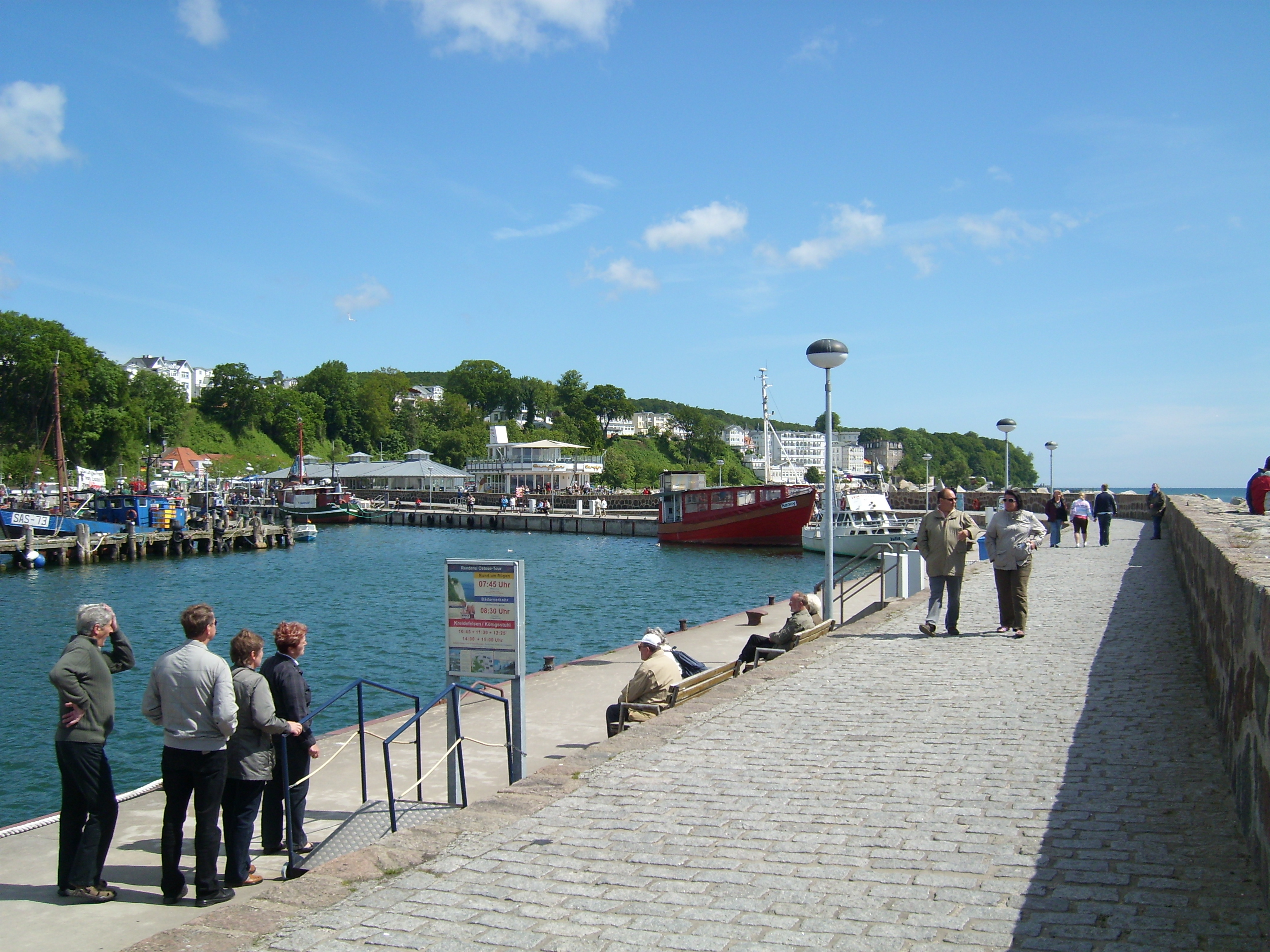 Außenmole des Sassnitzer Hafens, Rügen